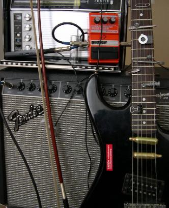 my ibanez prepared